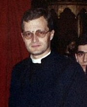 Jean-Michel Faure, futur évêque de l'Union sacerdotale Marcel-Lefebvre, puis de la Société sacerdotale des Apôtres de Jésus et Marie, vers 1980. Il est frappé par l'excommunication latæ sententiæ depuis sa consécration illicite des mains de Richard Williamson, en 2015.